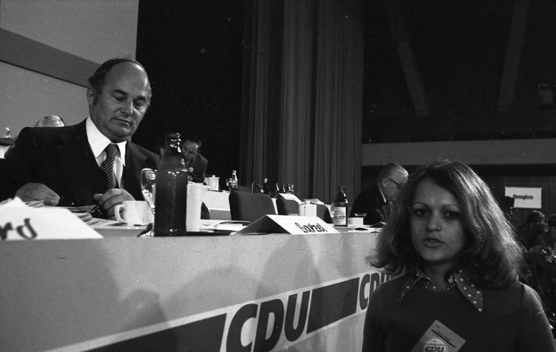 CDU-Parteitag 1972 in der Wiesbadener Rhein-Main-Halle (v.l.n.r.: Barzel / Tochter Claudia) 9.-11.10.1972